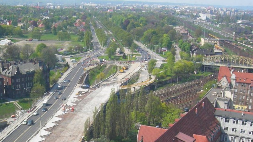 Gdańsk. Na środku, od lewej: Plac Zebrań Ludowych, Brama Oliwska (w środku), pruski tzw. "żółty wiadukt" z około 1910. Na pierwszym planie wiadukt Błędnik, w trakcie remontu w 2006 r.